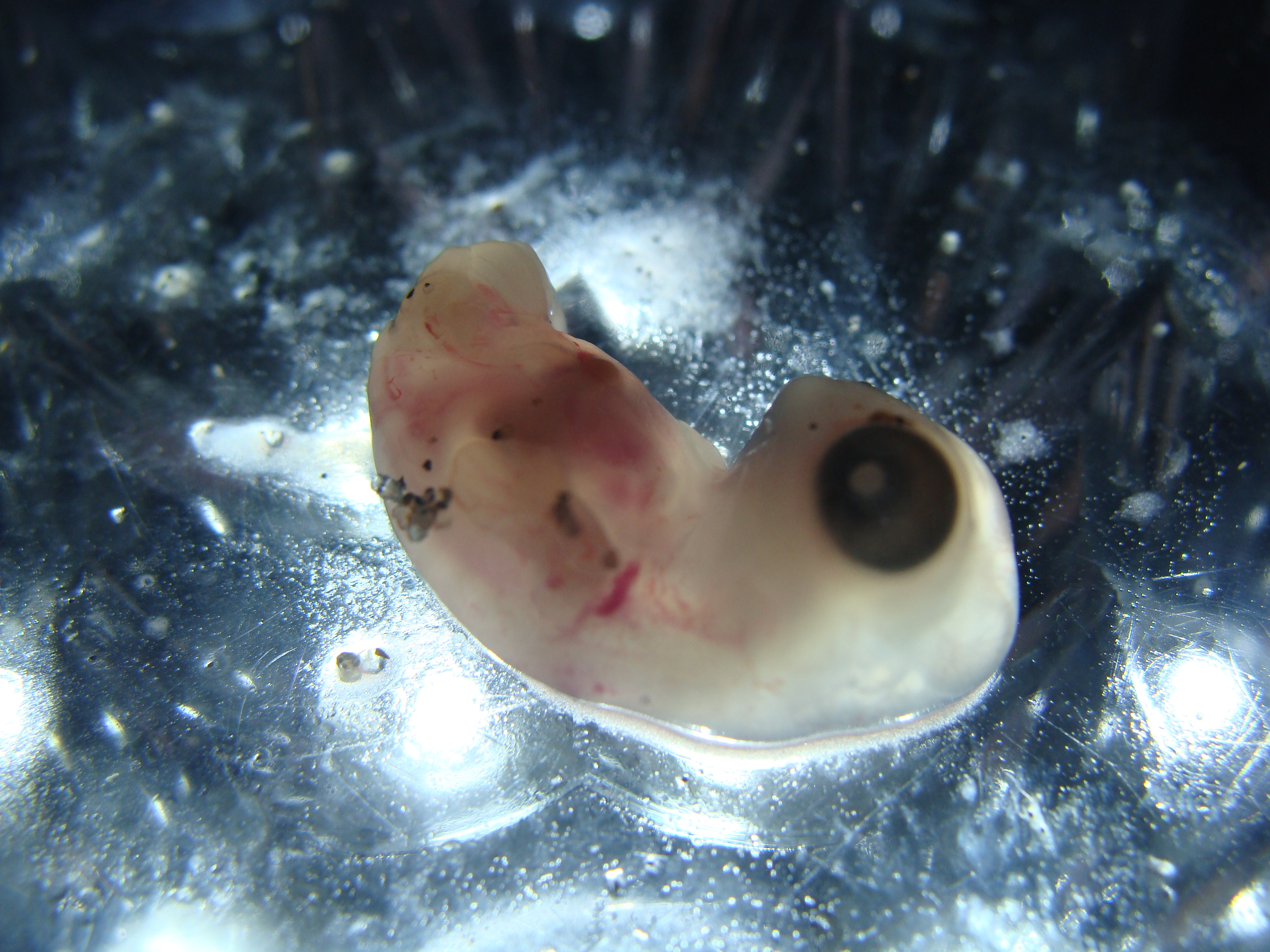 embrión de tortuga marina Lepidochelys olivacea, Oaxaca Mexico